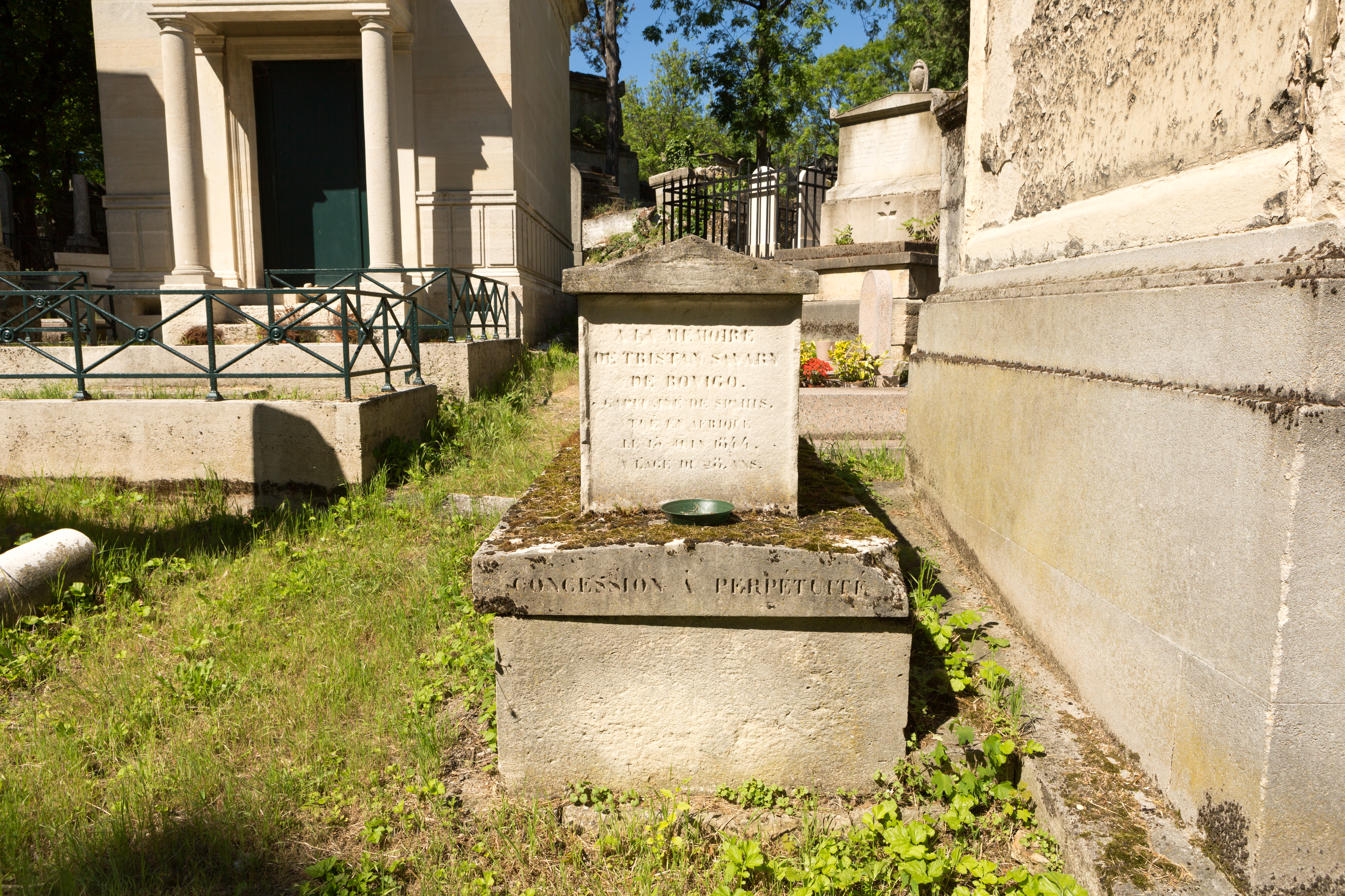 Sépulture d'Anne Jean Marie René Savary (1774-1833), général français, particulièrement connu comme homme de confiance de Napoléon Bonaparte et comme ministre de la Police de 1810 à 1814 ; et son épouse Marie-Charlotte de Faudoas-Barbazan (1784-1841).